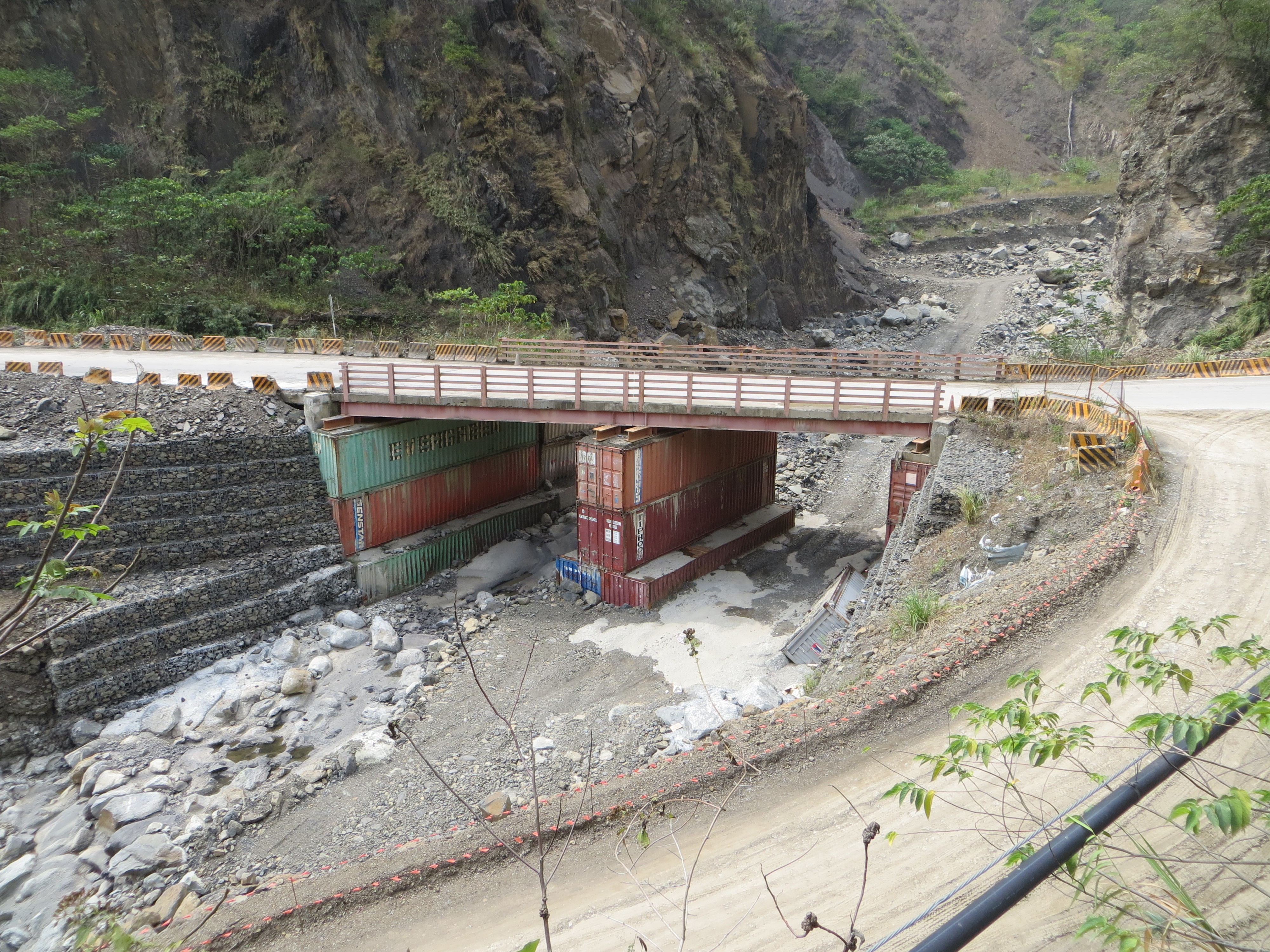 八八災後，公路總局為了快速搶通南橫，研發出以貨櫃為橋台、橋墩，並結合鋼骨結構的臨時基礎設施──鋼便橋，充作中期復建；圖中南橫炳才橋搶通即是一例。現已隨新炳才橋通車而拆除。